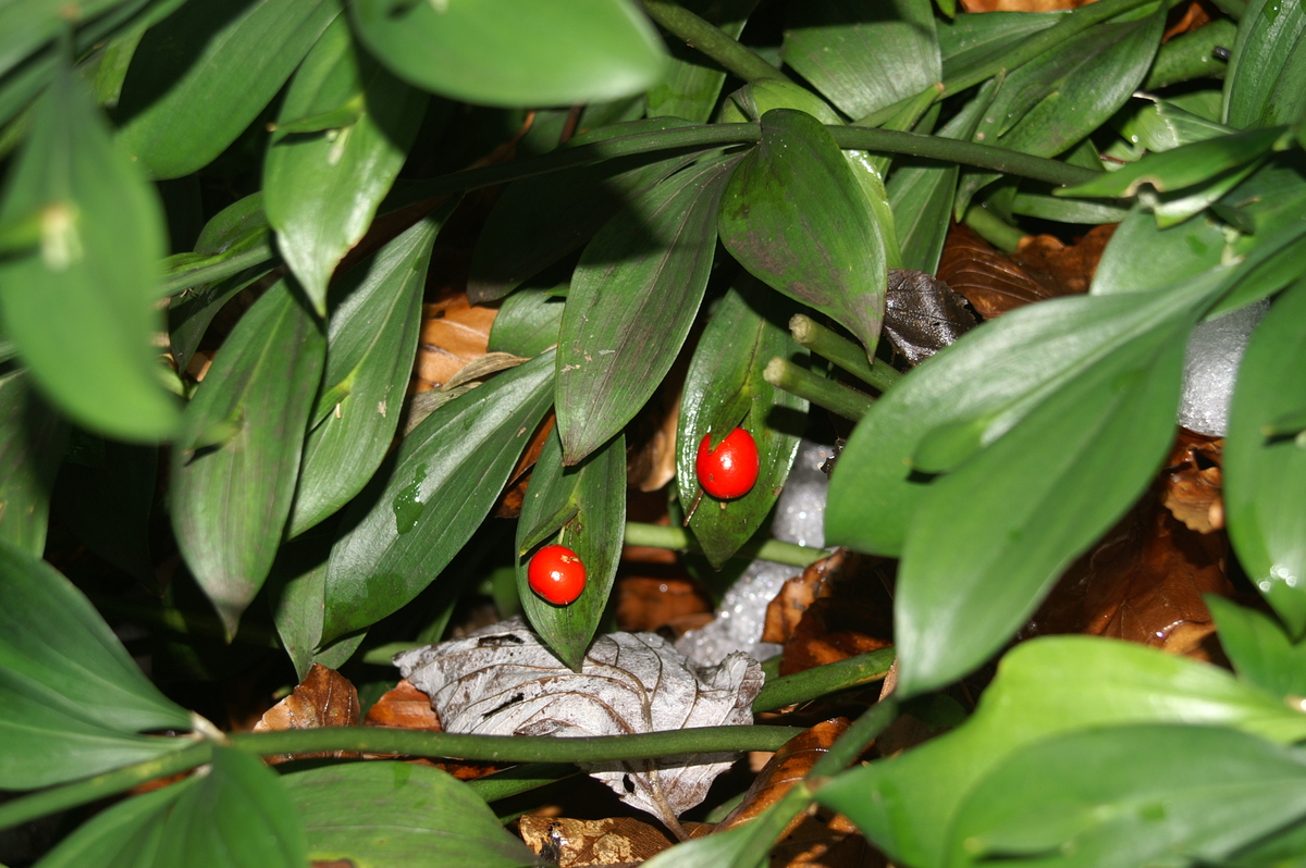 Širokolistna lobodika v Setnici.